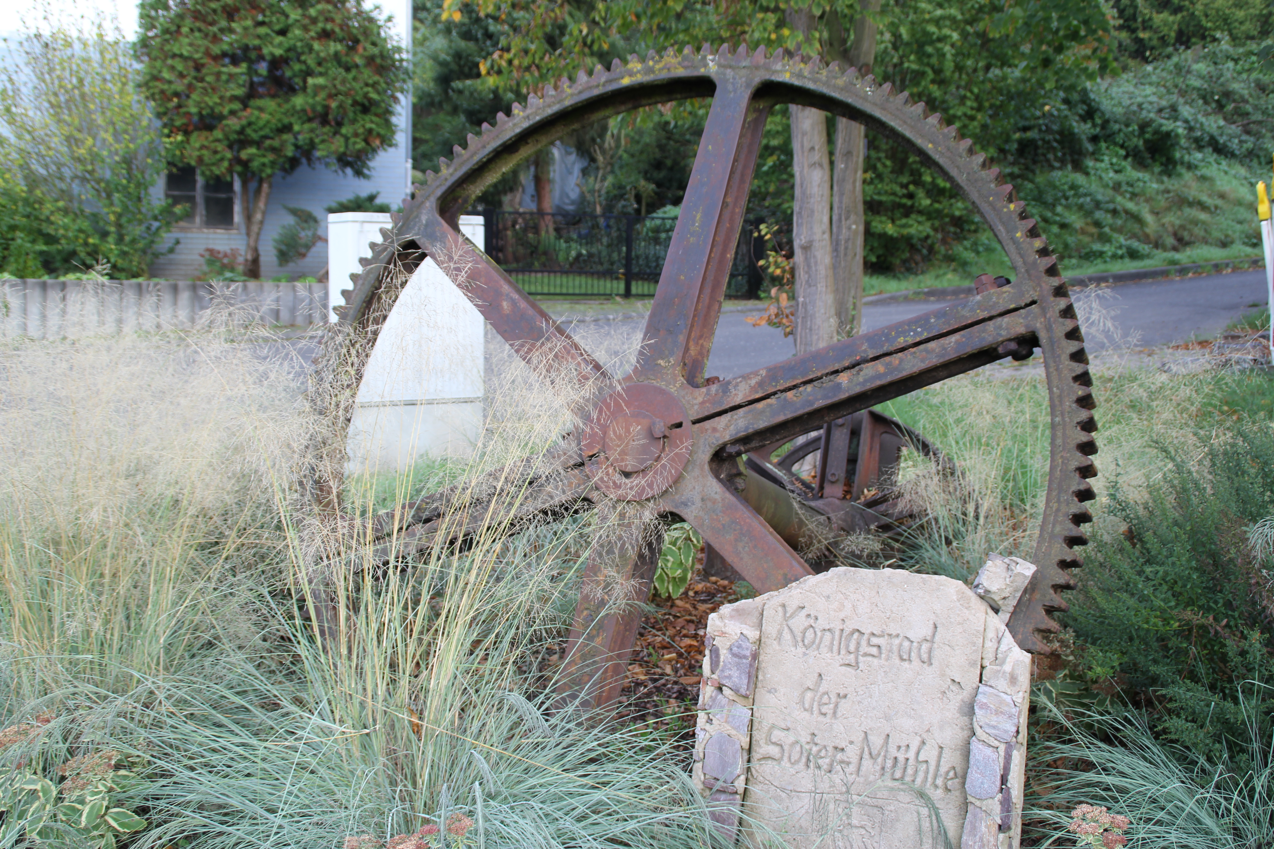 Das Königsrad der ehem. Kälberauer Mühle